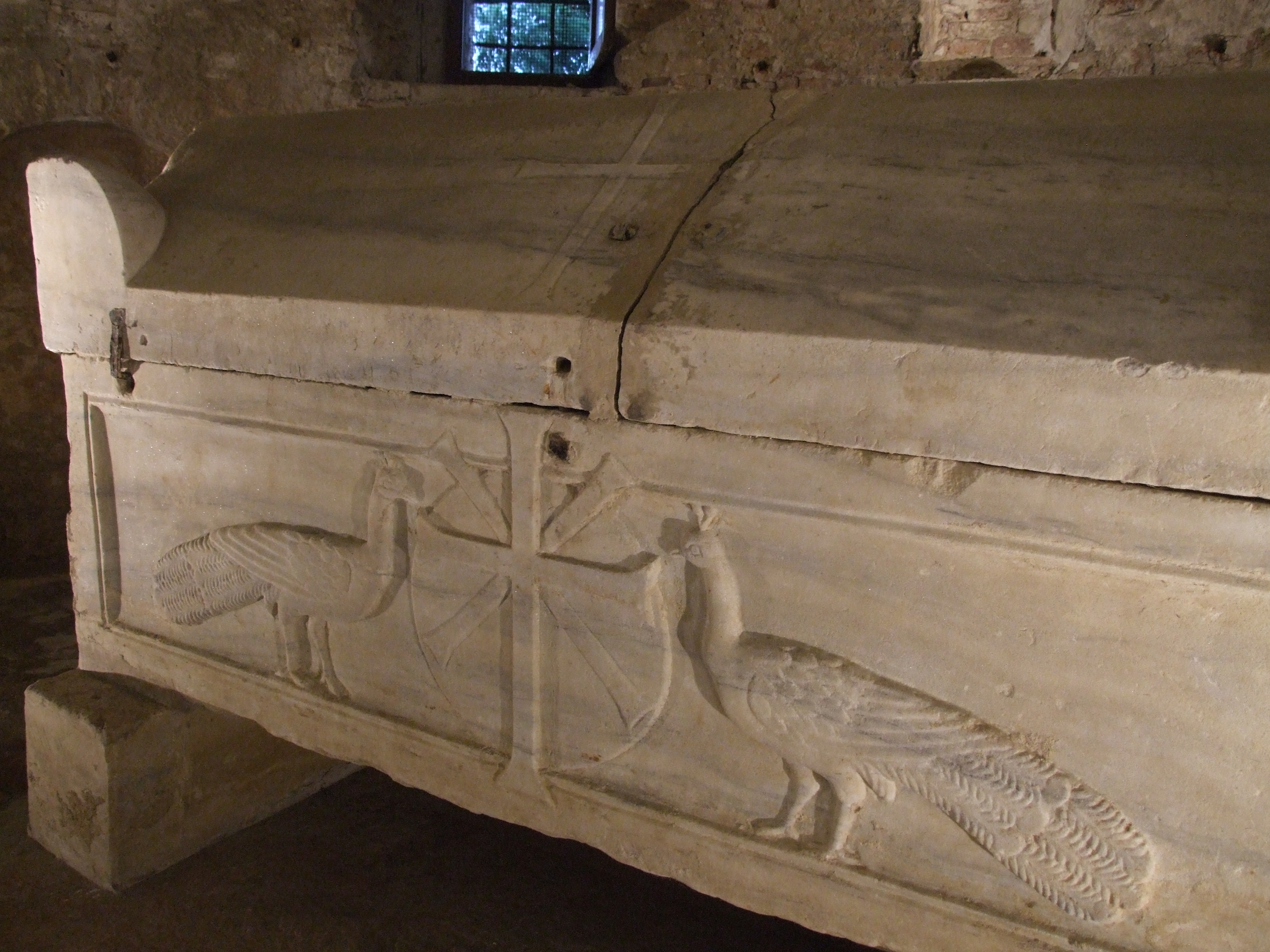 Abbazia di S. Gervasio - sarcofago in stile ravennate del VI sec. conservato nella cripta This is a photo of a monument which is part of cultural heritage of Italy.